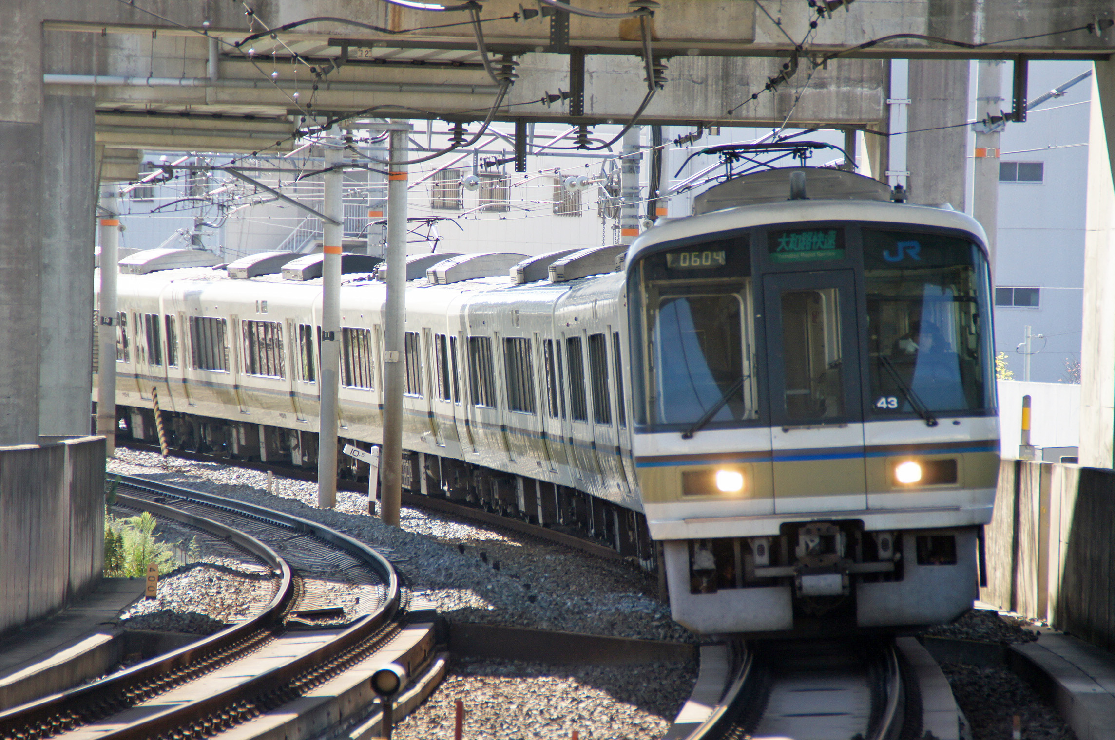 221系による大和路快速 JR難波行き